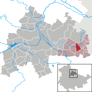 Mannstedt in Thuringia - District Sömmerda